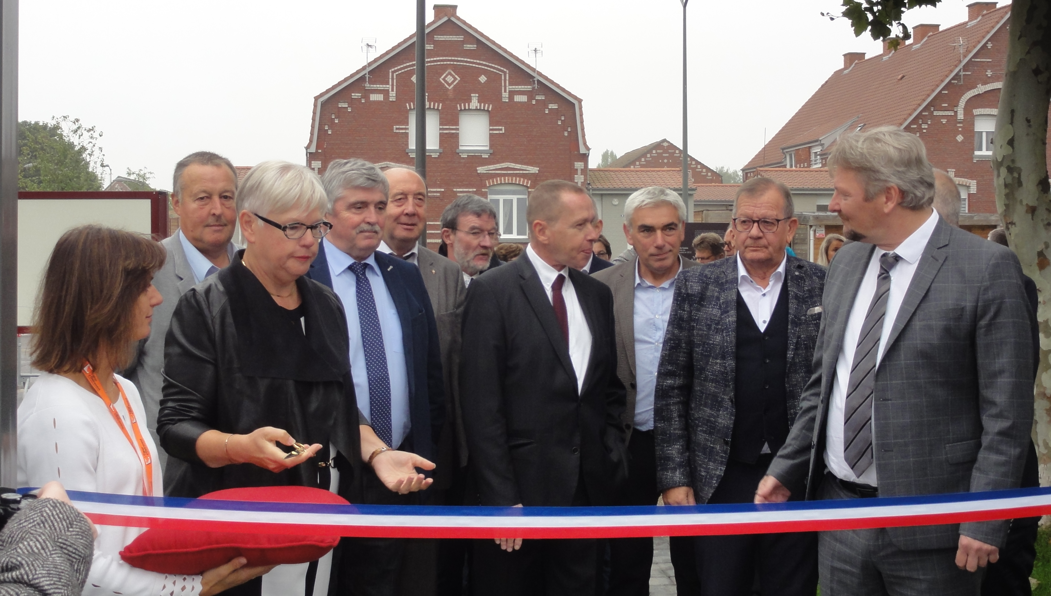 Inauguration de l'office de tourisme de la communauté de communes Cœur d'Ostrevent à Pecquencourt le 5 octobre 2019. Depicted place: Pecquencourt